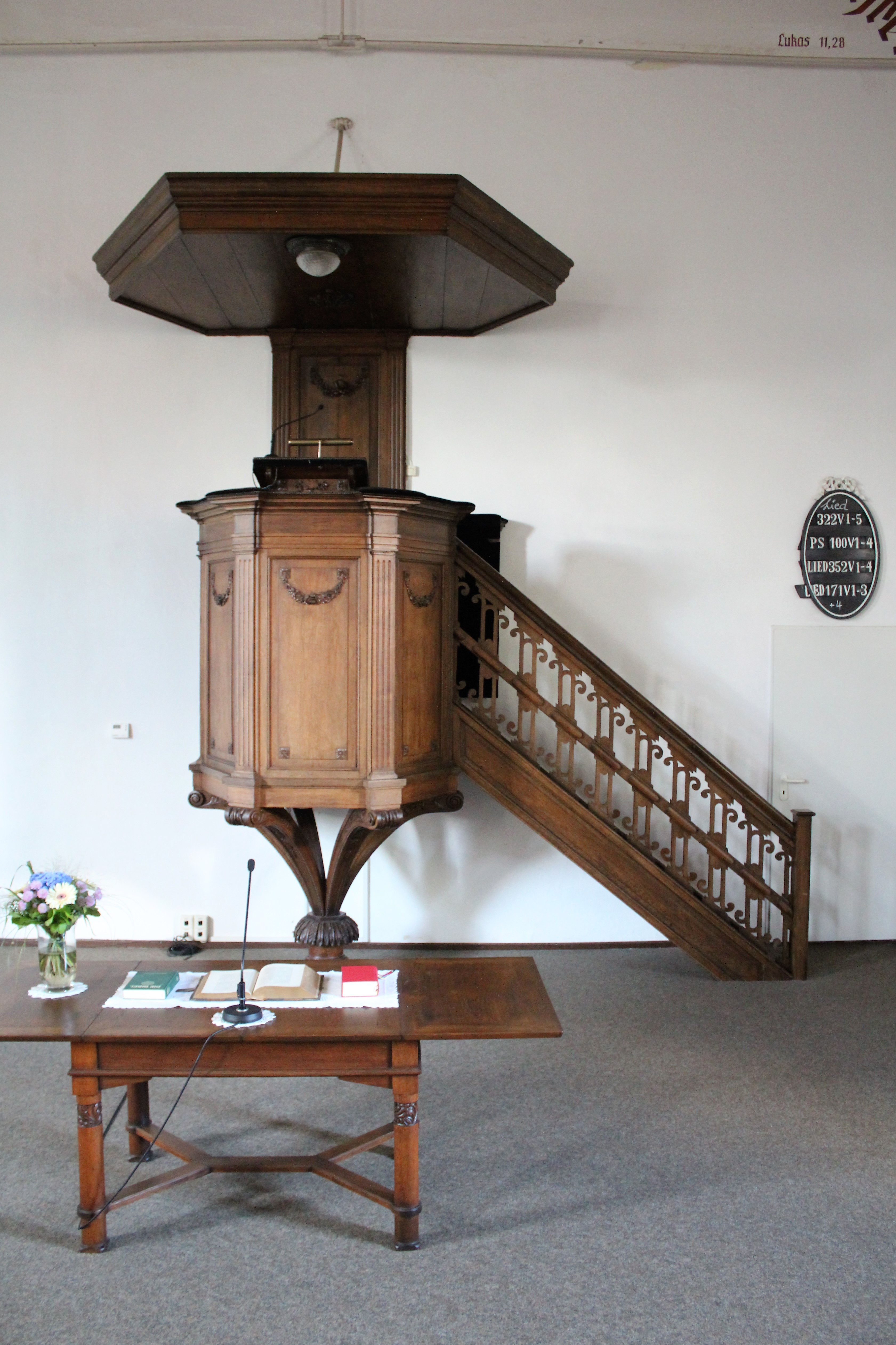 Ev.-reformierte Kirche Möhlenwarf, Landkreis Leer, Ostfriesland, Deutschland